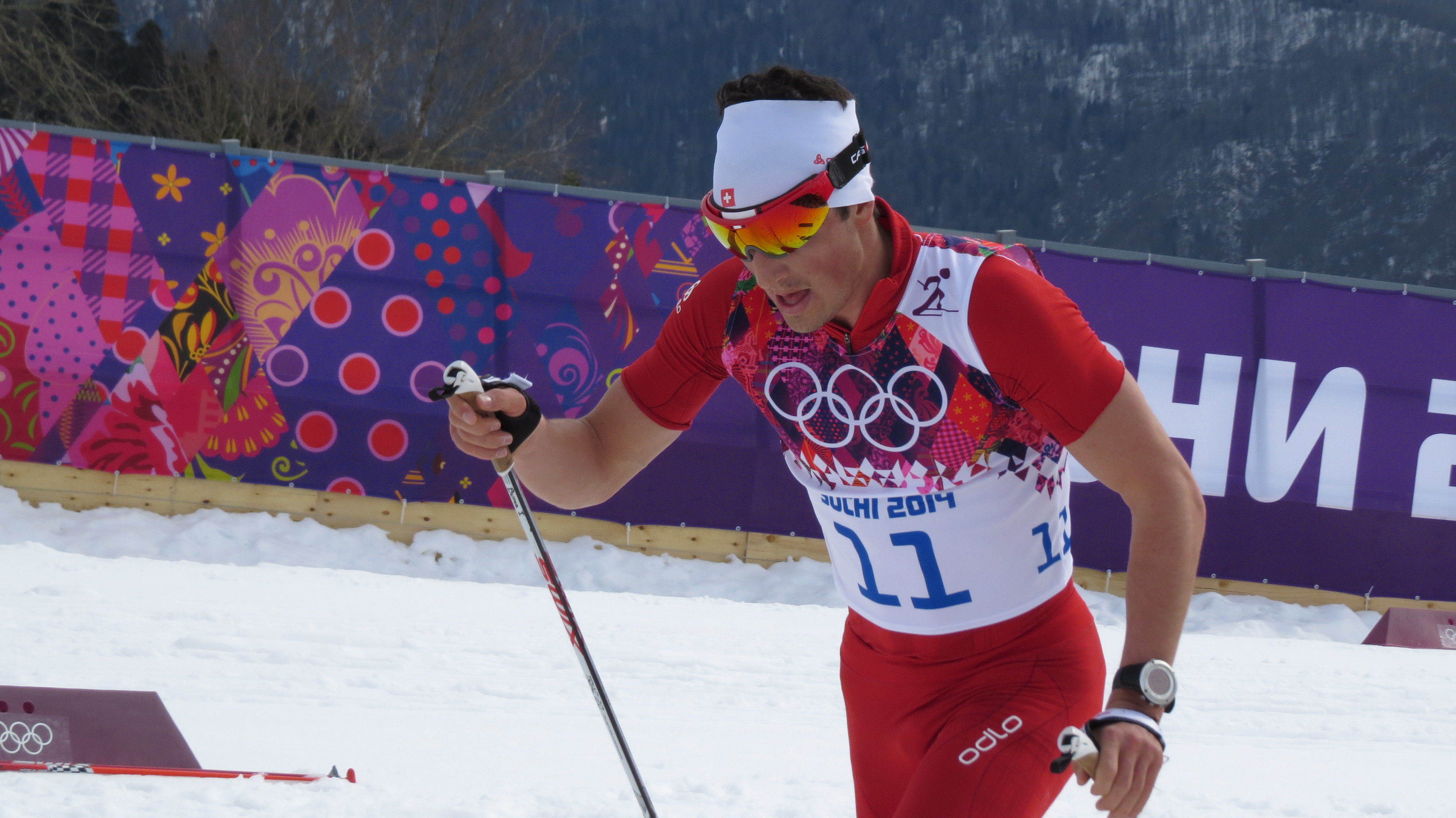 Лыжные гонки на зимних Олимпийских играх 2014 — 15 км классическим стилем (мужчины)